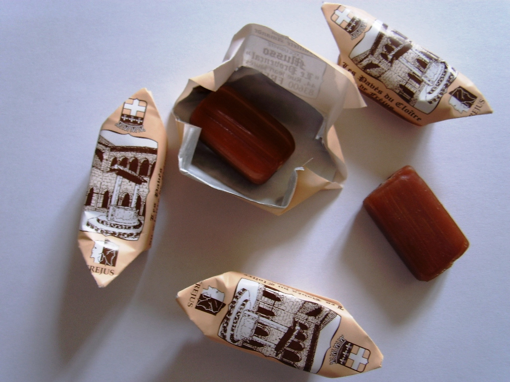 Pavés du Cloître, bonbon, spécialité de la ville de Fréjus (83)